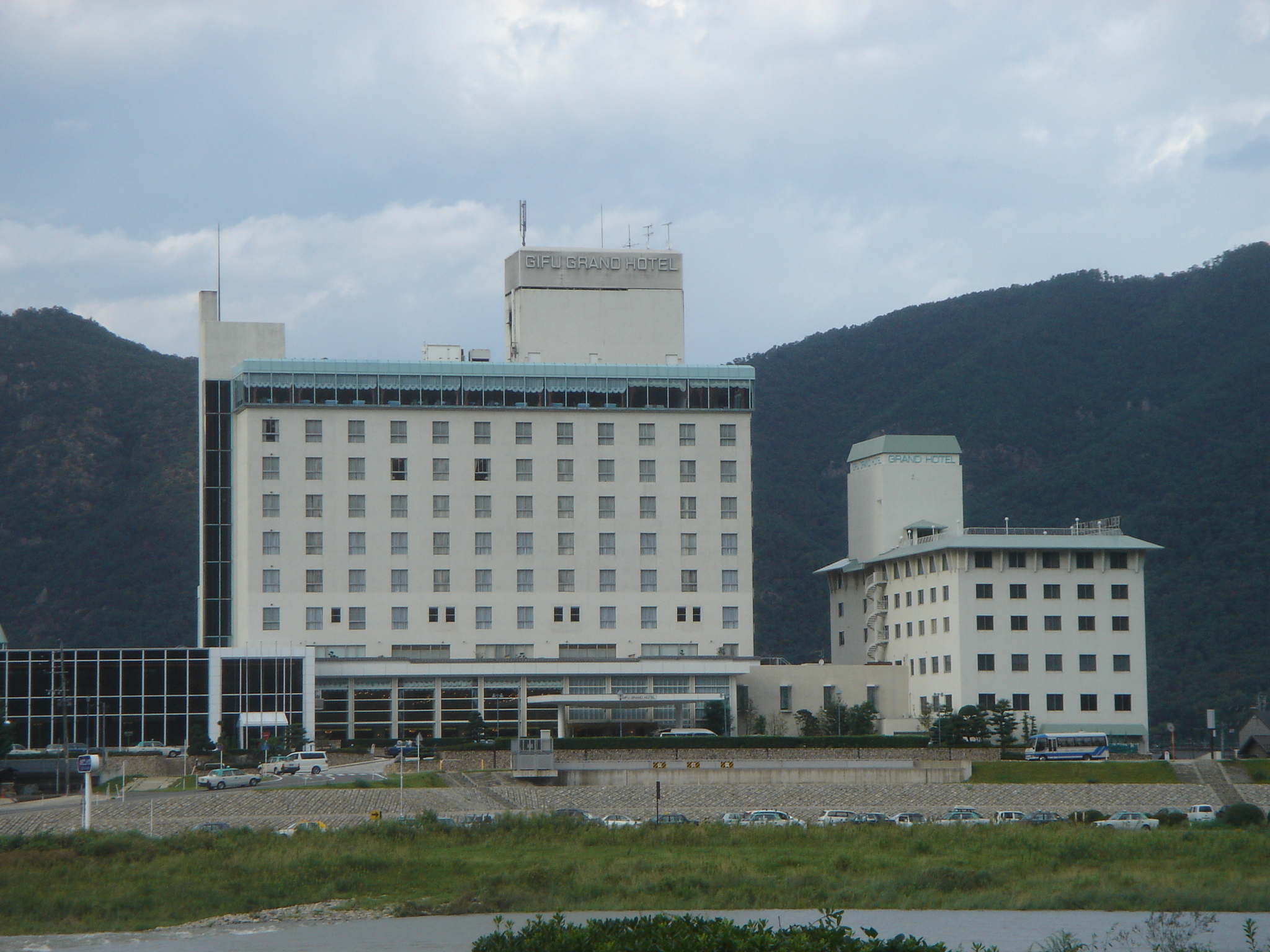 Gifu Grand Hotel in Gifu Prefecture.（岐阜グランドホテル）,Gifu,Gifu,Japan(岐阜県岐阜市)で長良川をはさんだ対岸より撮影。